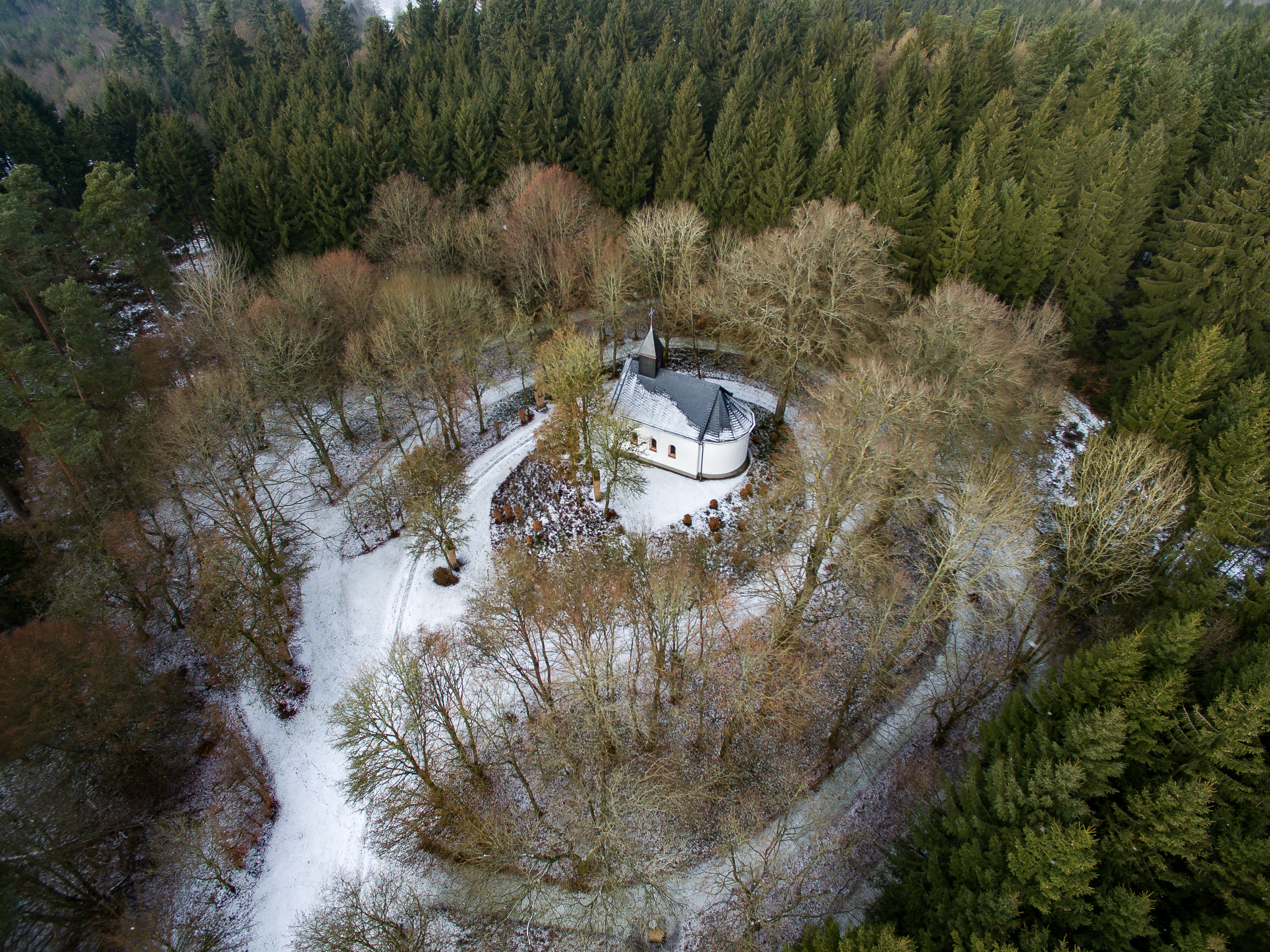 Heyerbergkapelle (Borler, Eifel)